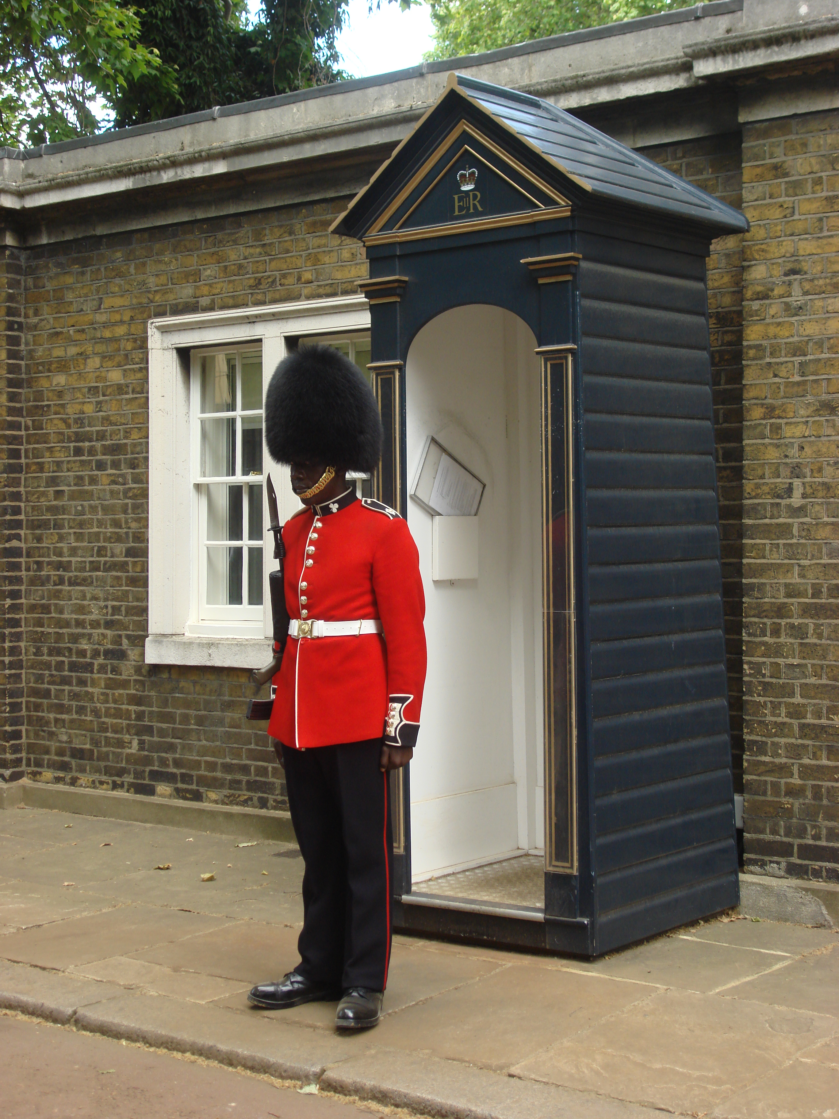 Queens guard